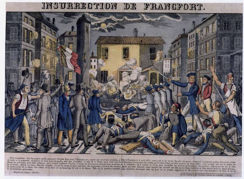 FRankfurter Wachensturm 1833